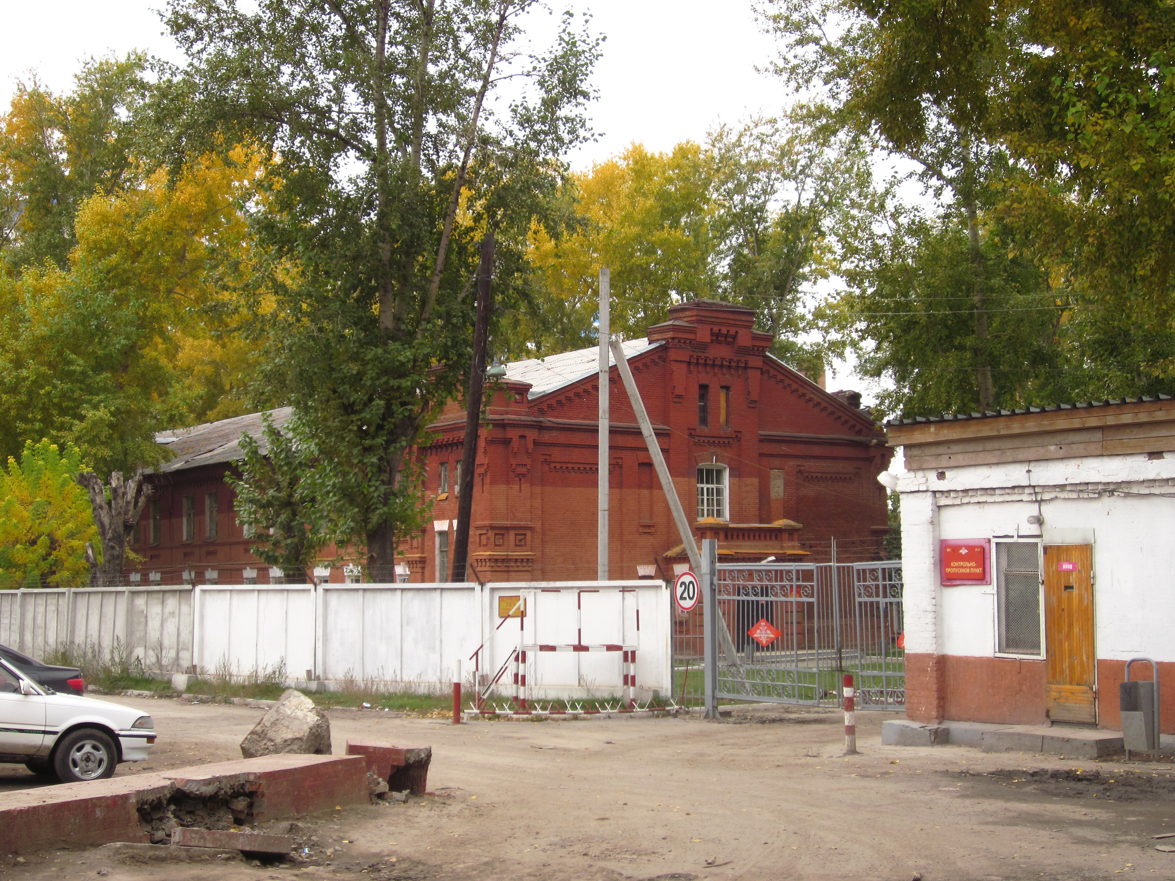 Военный городок. Казарма батальонная 26